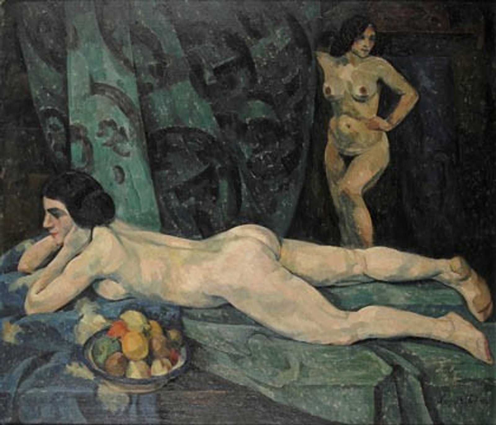 Leopold Durm: Gemälde Interieur mit weiblichen Aktfiguren, ca. 1911